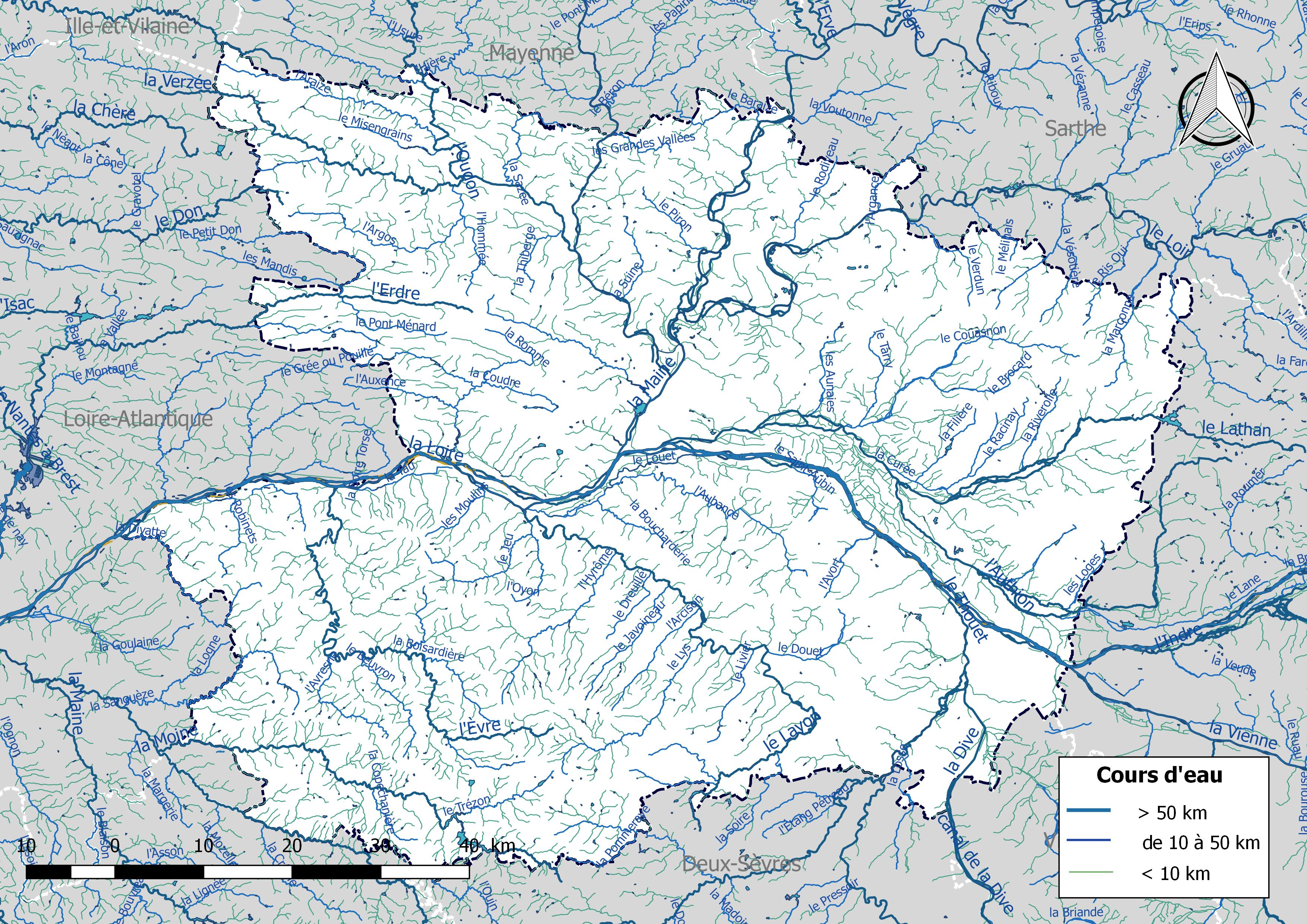 Réseau hydrographique du département de Maine-et-Loire (France).